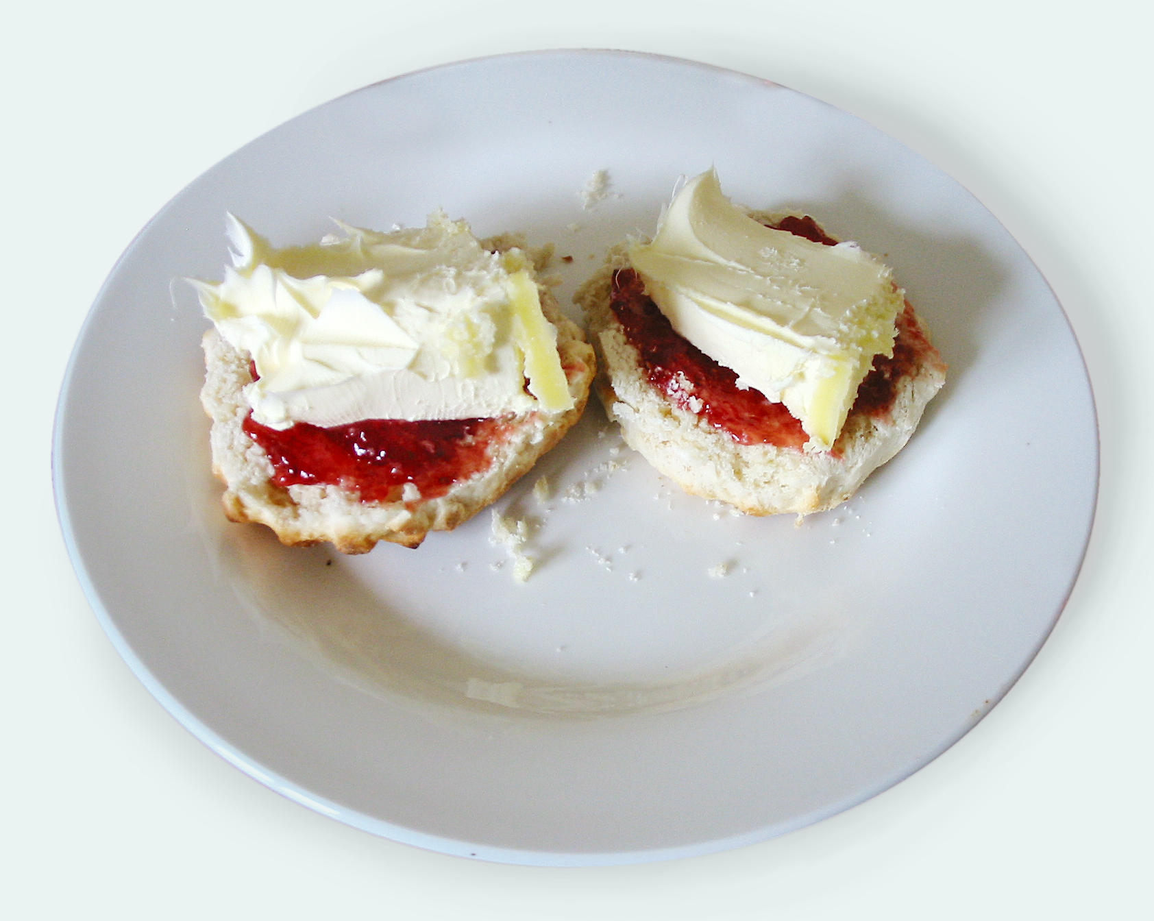 Scones